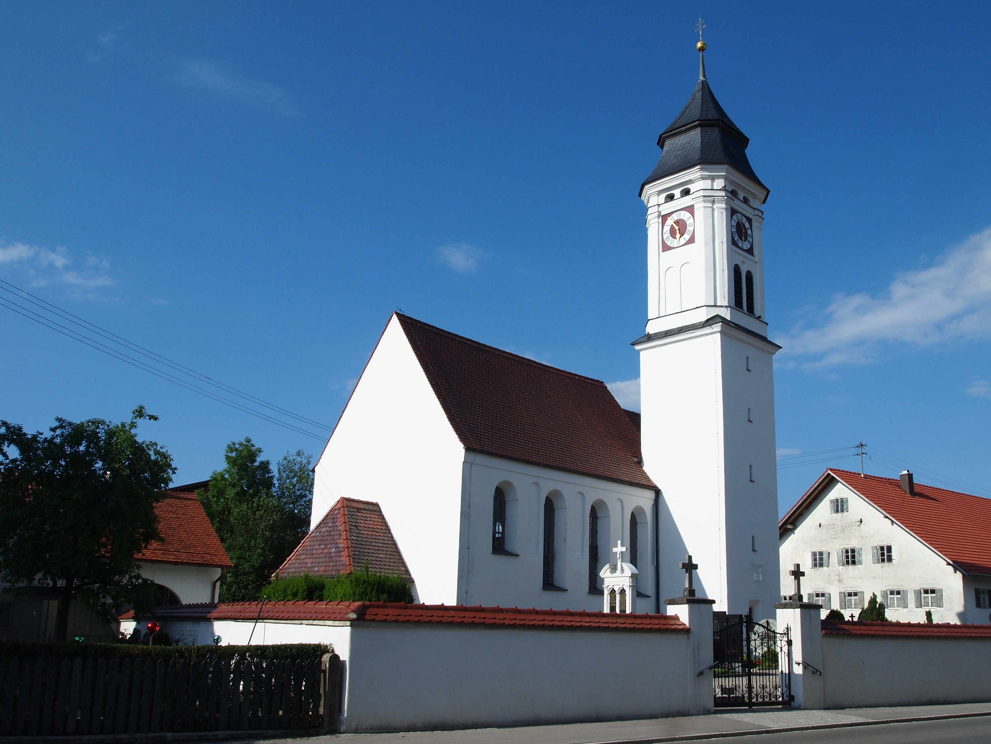 Leinau, Gemeinde Pforzen, Landkreis Ostallgäu, Kath. Filialkirche St. Nikolaus, Dorfstraße 19